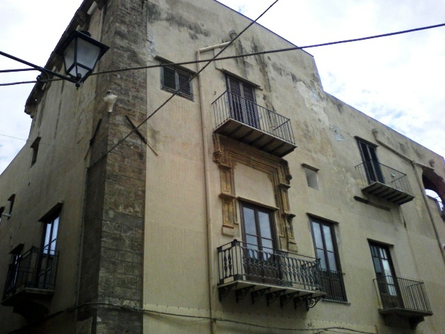 Palazzo Palmerini, fra Via Buonarroti e Madonna dell'Alto